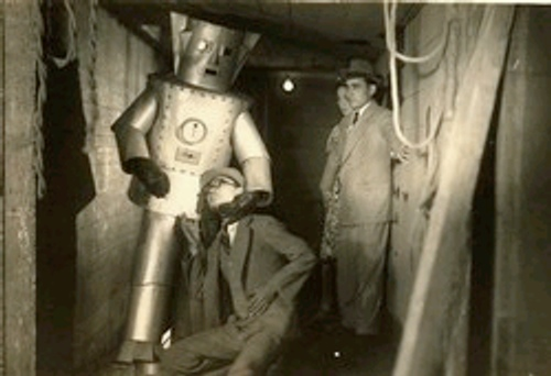 『怪電波の戦慄 第二篇 透明人間篇』（1939年）のスチル写真、水原洋一。